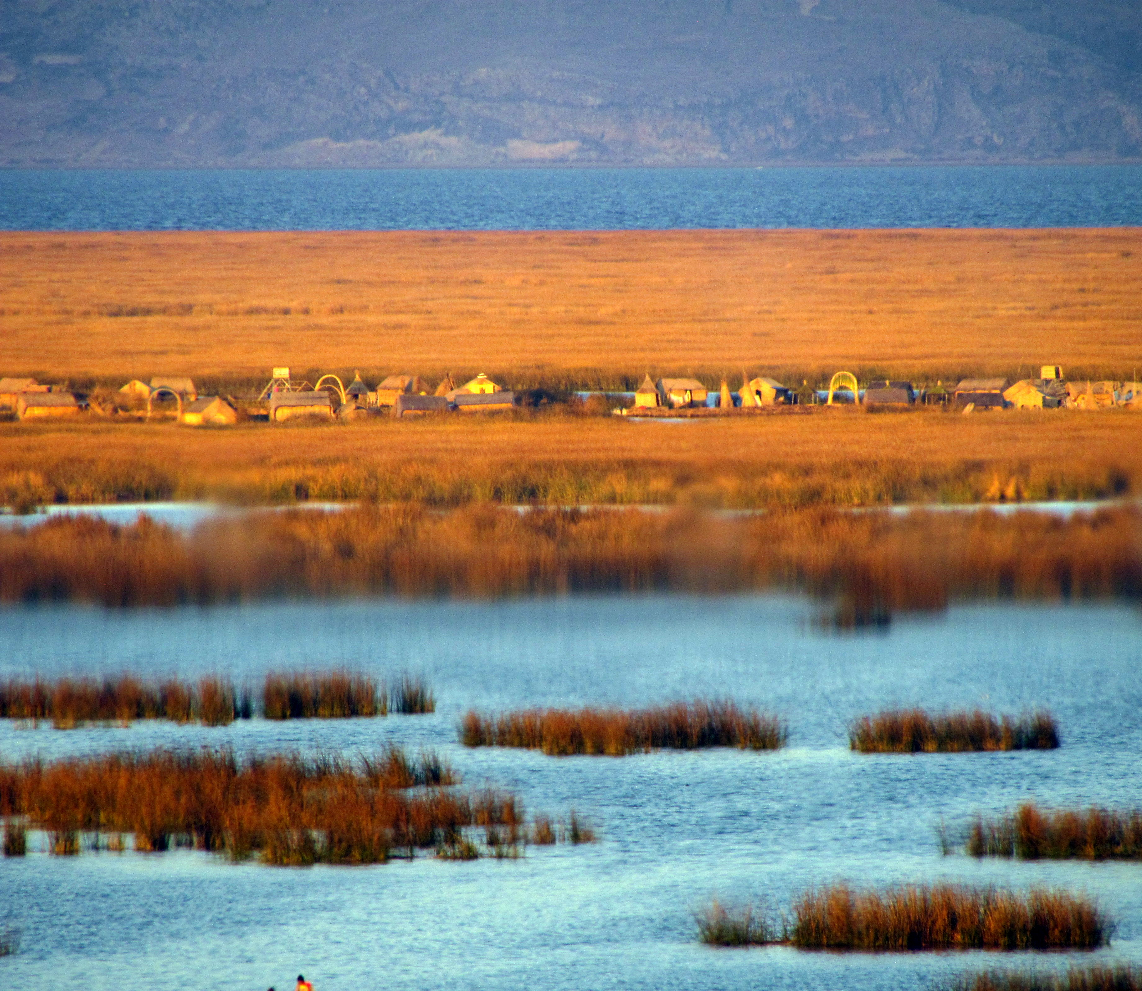 118 Reeds Lake Titicaca Peru 3268